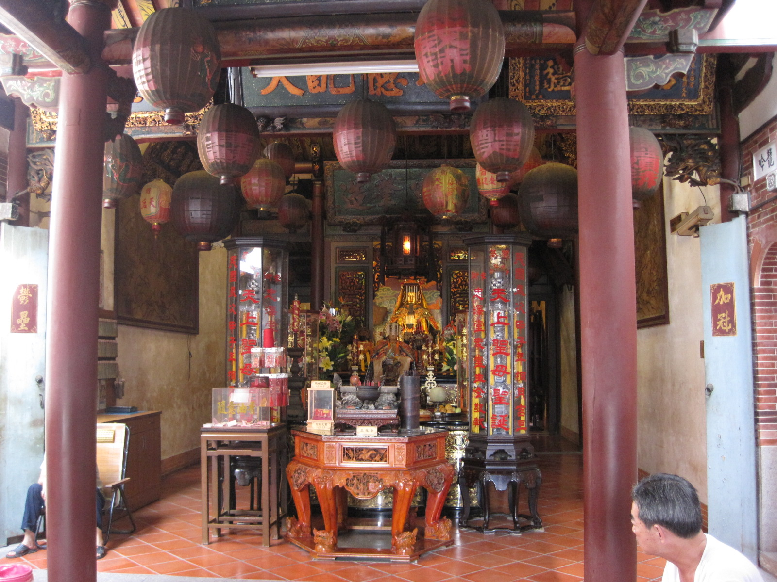 開基天后宮正殿